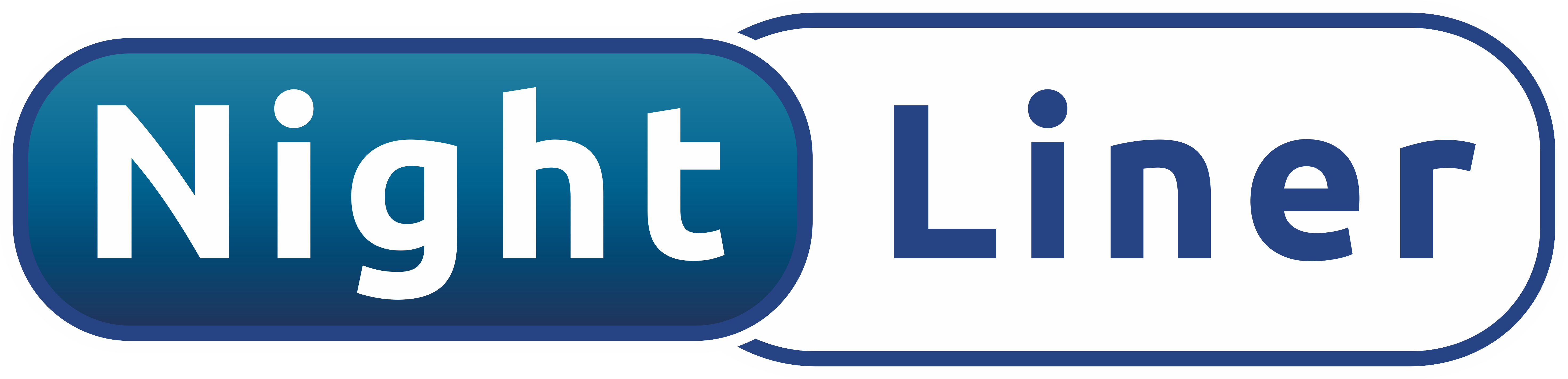 Nightlinersymbol in Nürnberg